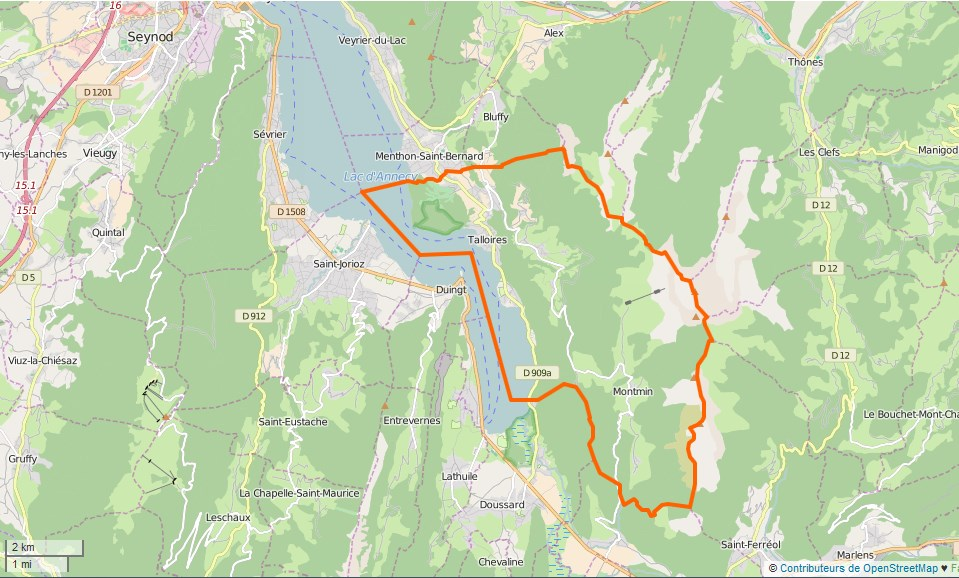 Talloires-Montmin Limite communale This map may be incomplete, and may contain errors. Don't rely solely on it for navigation.